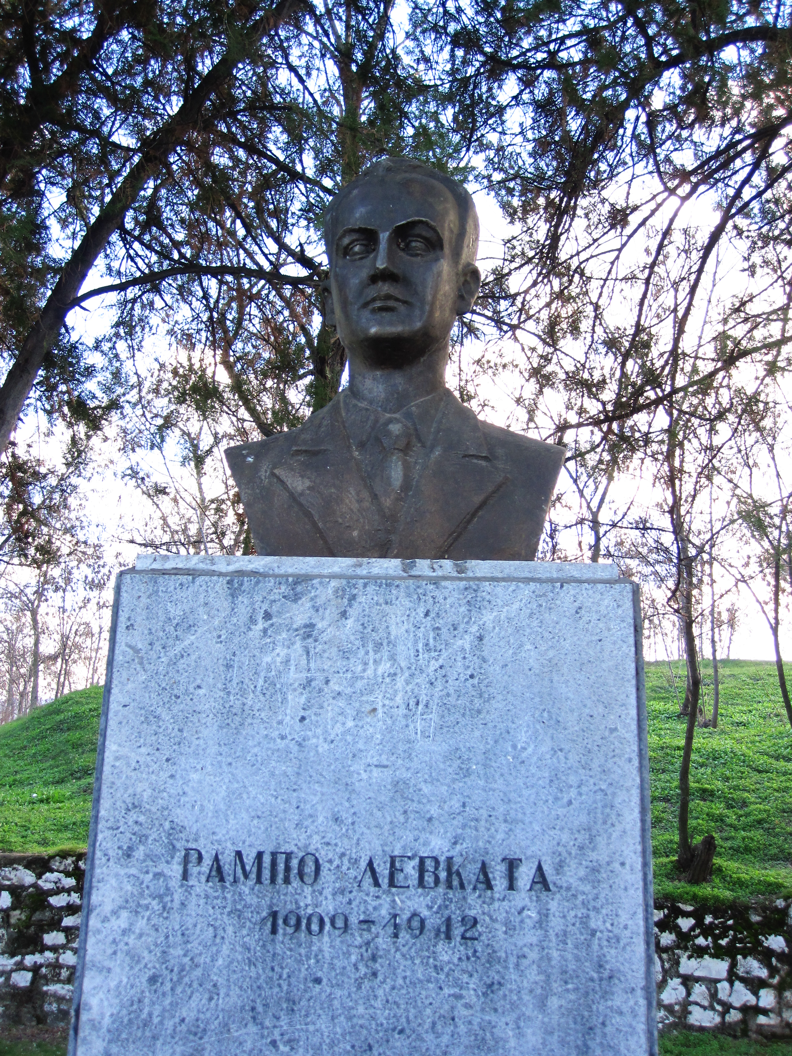 Биста - Рампо Левката - Прилеп